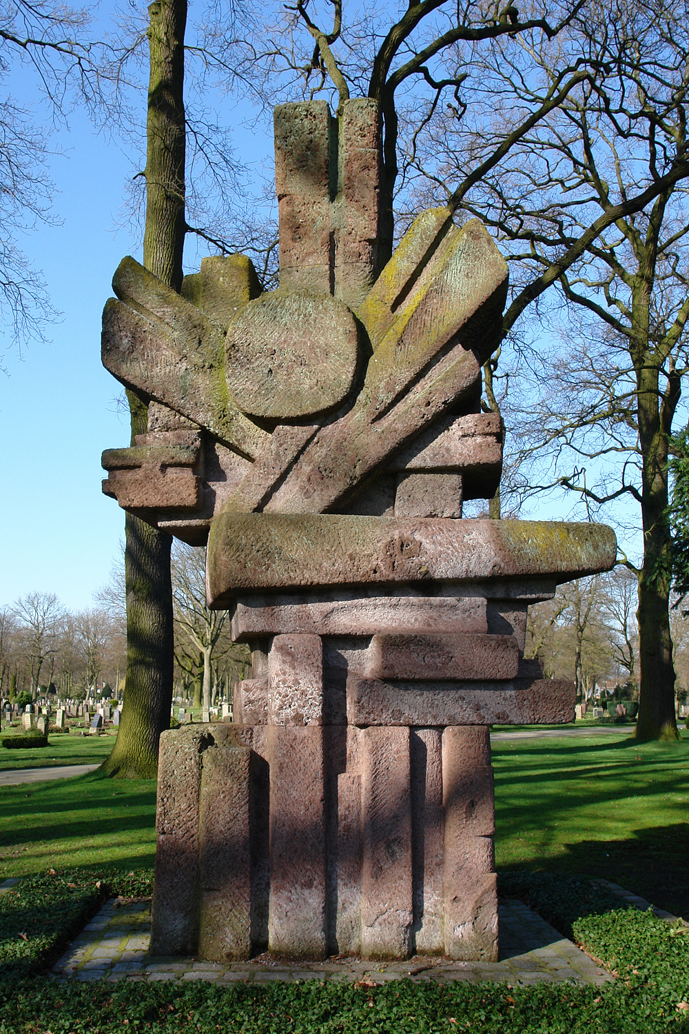 Waller Friedhof in Bremen. Denkmal für die gefallenen Verteidiger der Bremer Räterepublik, 1972 von Georg Arfmann geschaffen (Ersatz für das 1933 zerstörte Denkmal von Bernhard Hoetger)